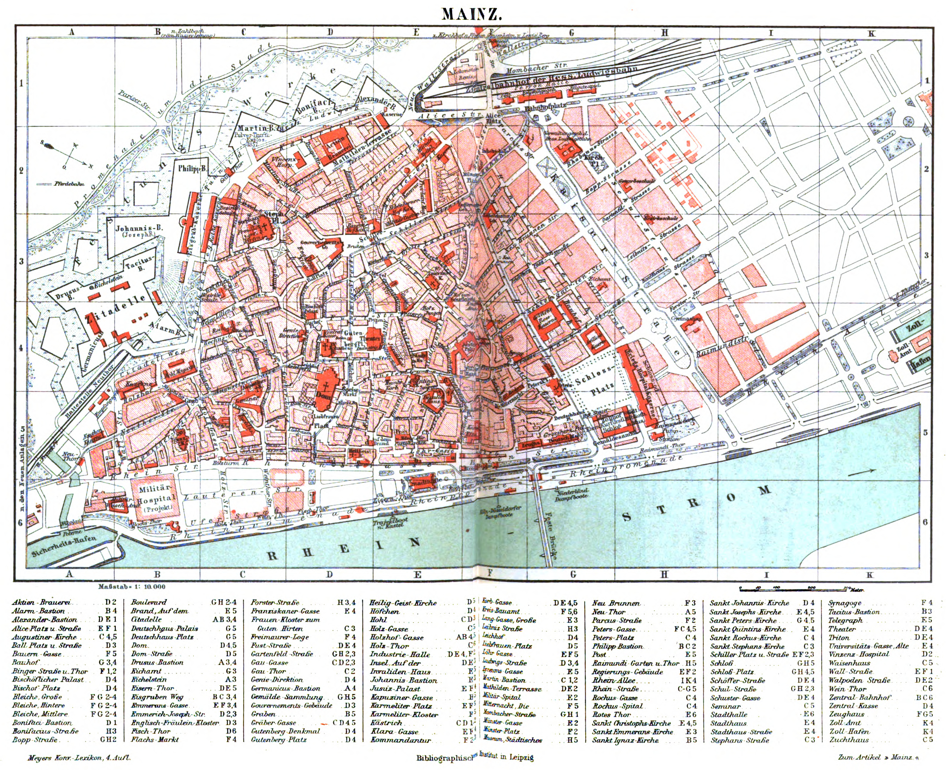 Stadtplan (1 : 10 000) von Mainz mit Straßenverzeichnis